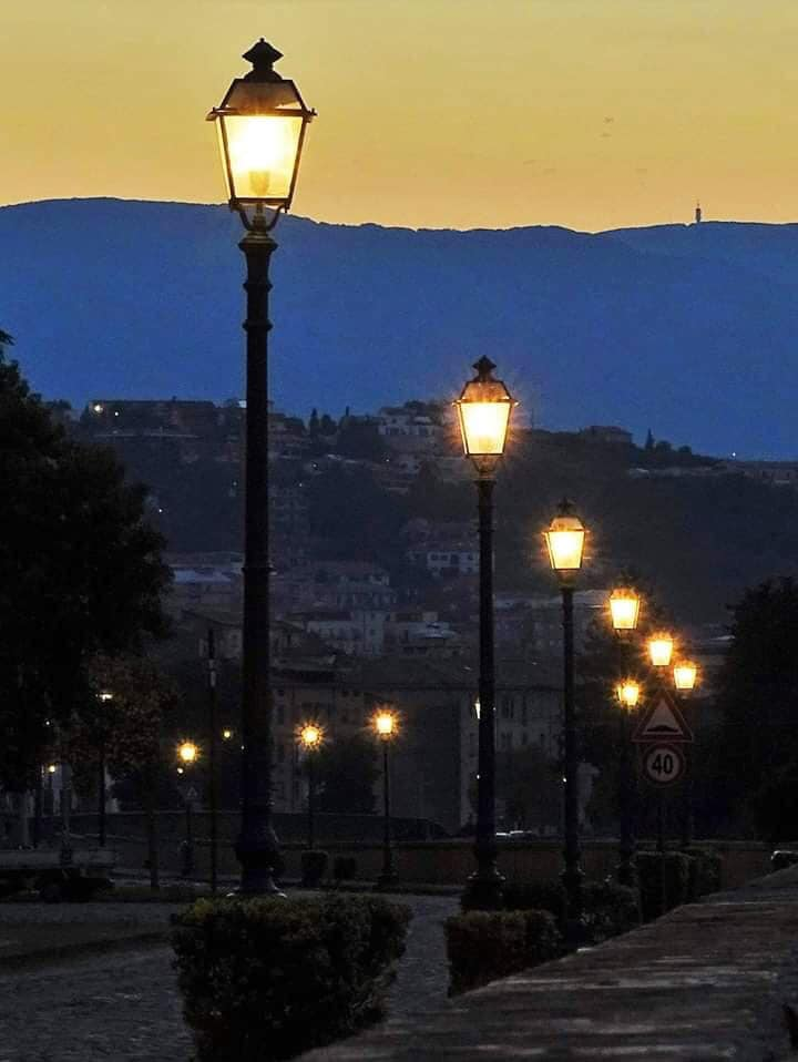 Scorcio notturno parco fluviale nel centro storico di Cosenza